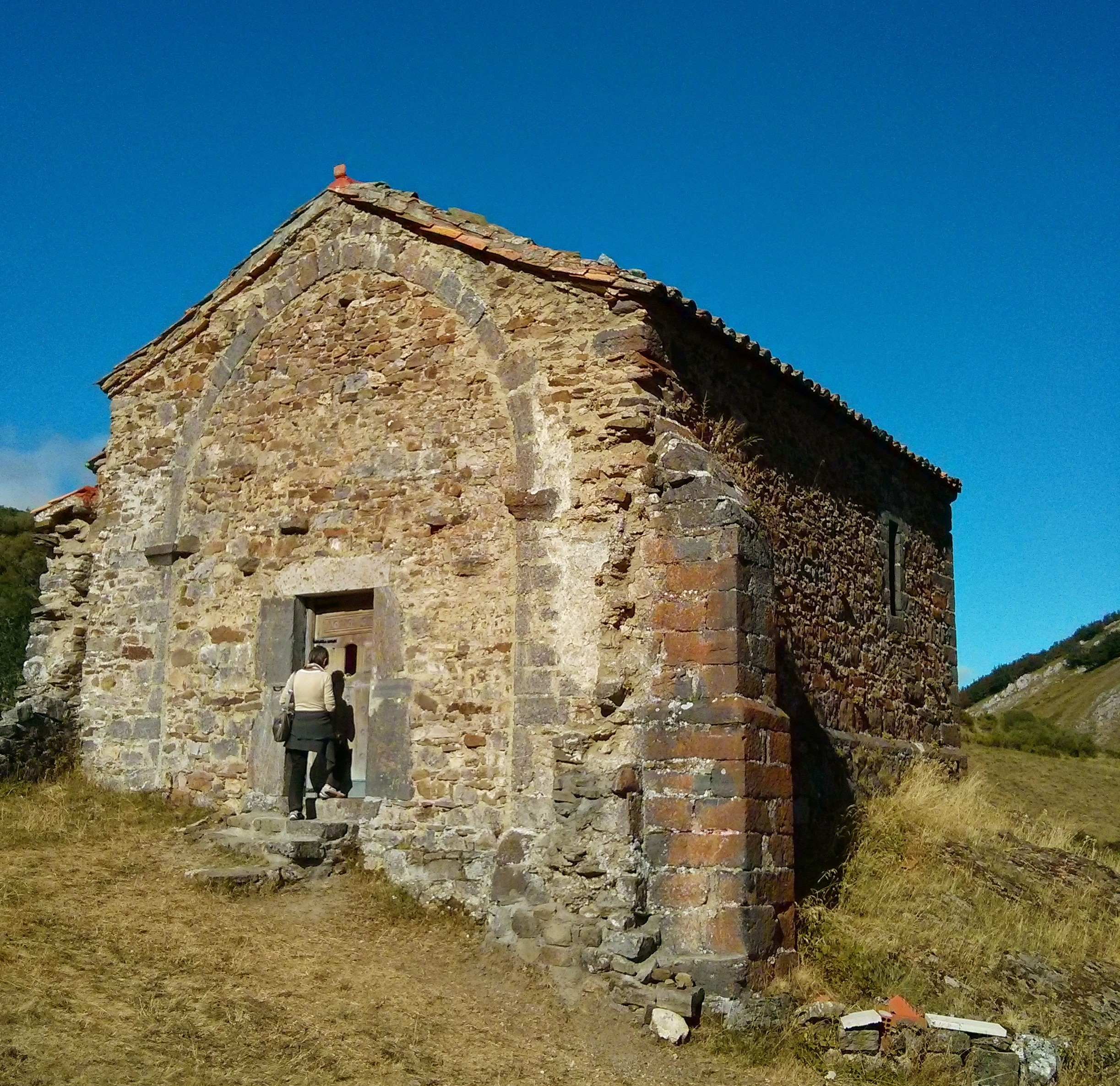 Ermita de Pegarúas